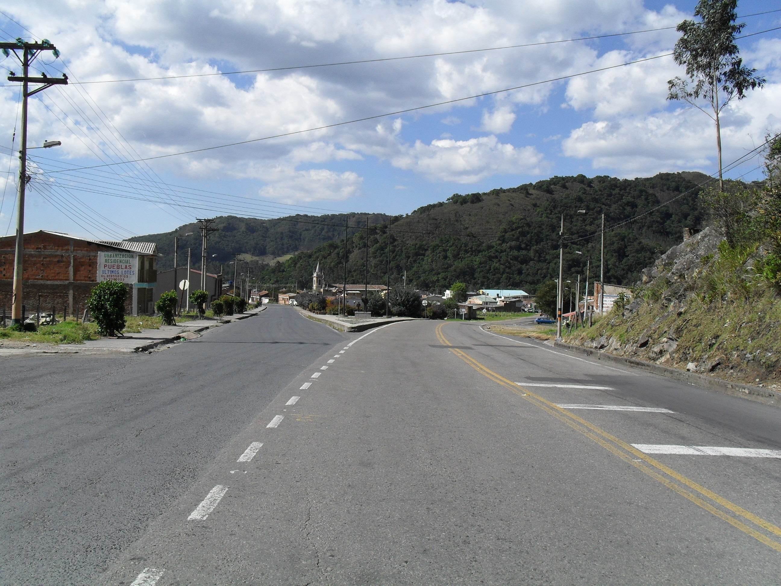 Fotografía de la entrada, via Tunja al municipio de Arcabuco Boyacá Colombia